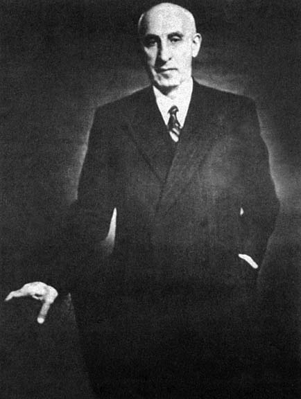 منبع